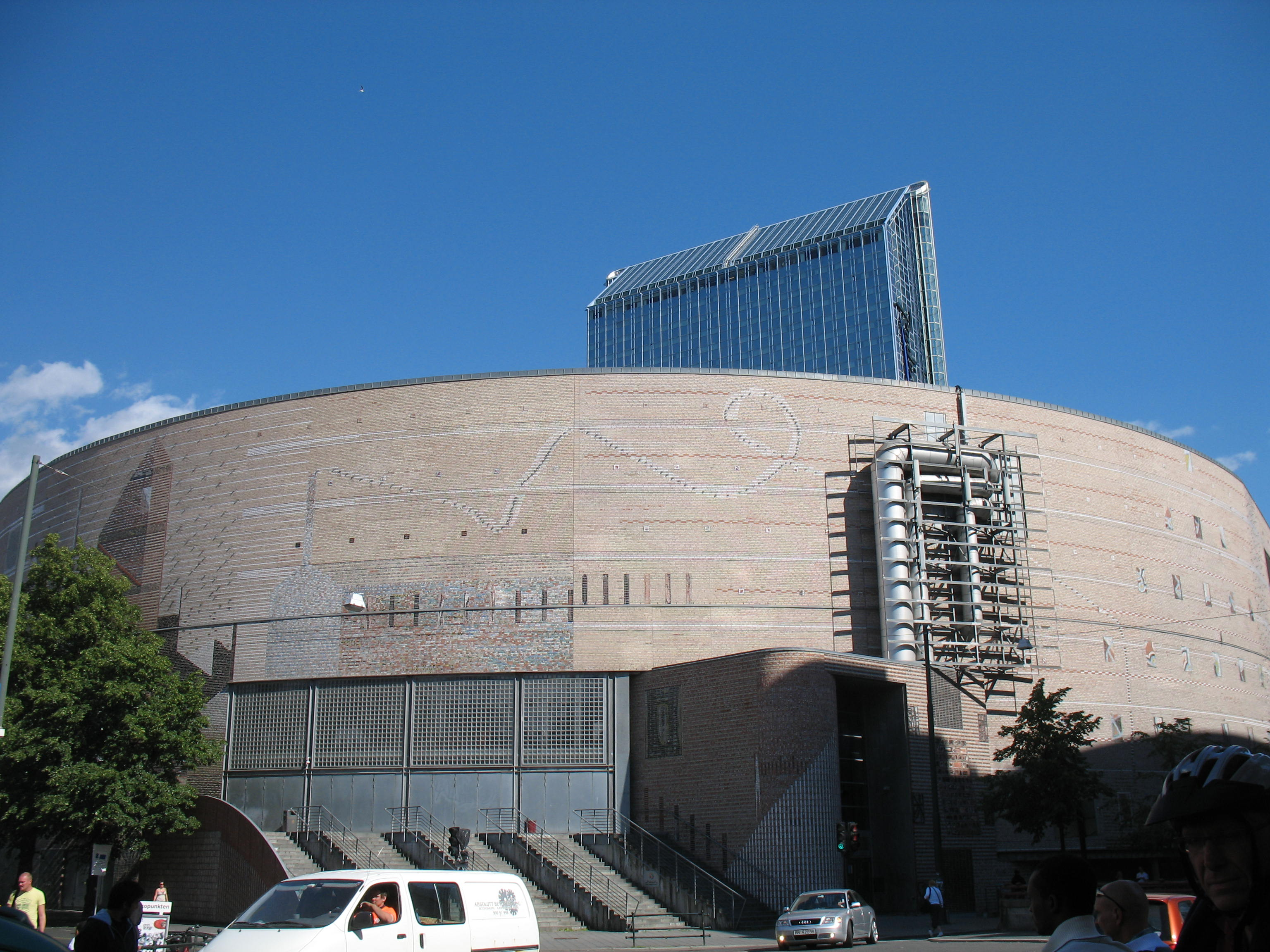 Oslo Spektrum is an indoor arena in the heart of Oslo, Norway